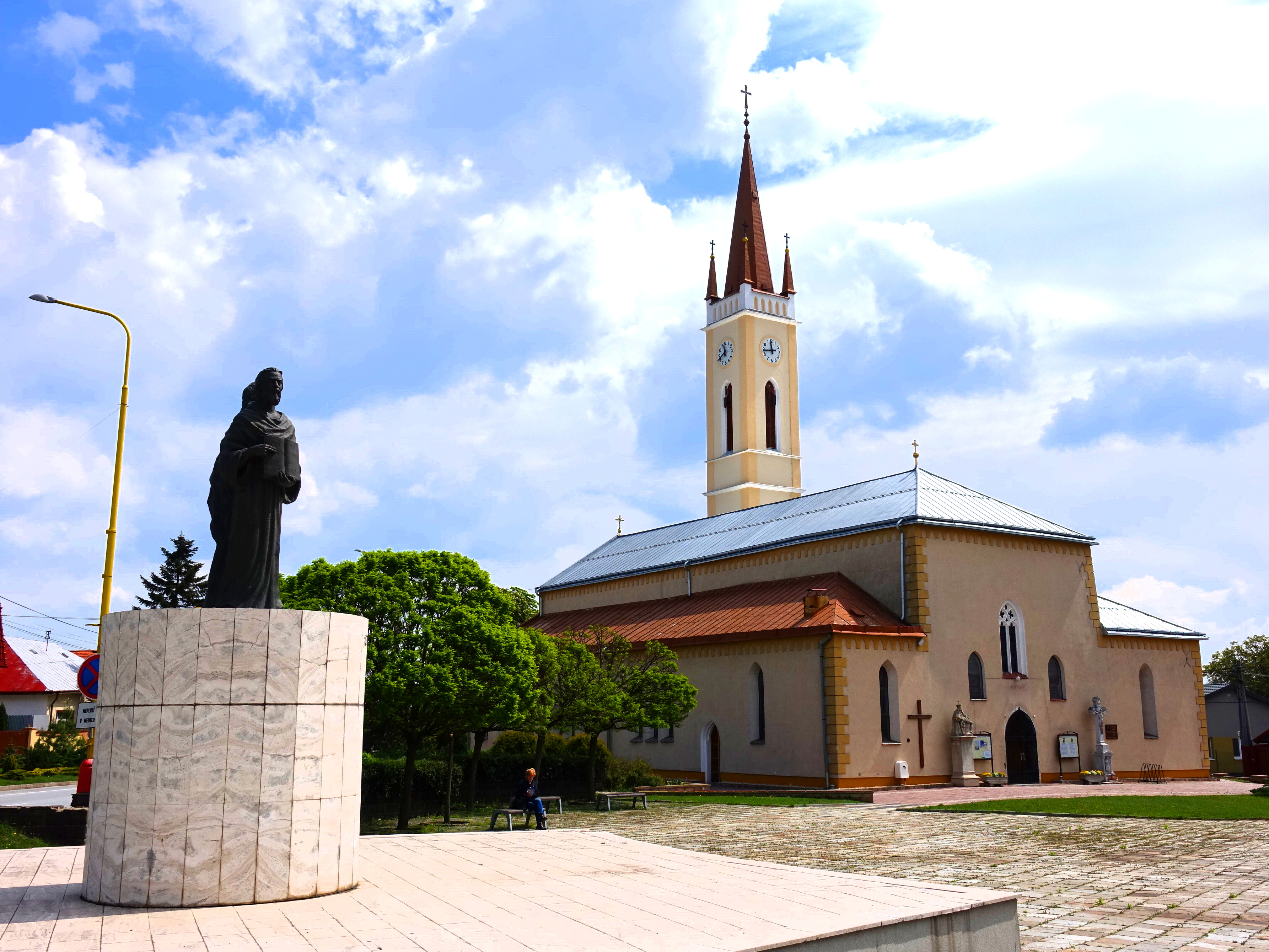 Máj 2019. Súsošie sv. Cyrila a Metoda, rímsko katolícky kostol, mesto Sečovce. Okres Trebišov, Slovensko.